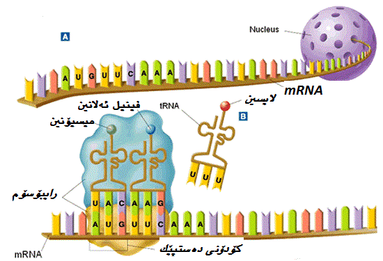 کوردی: t